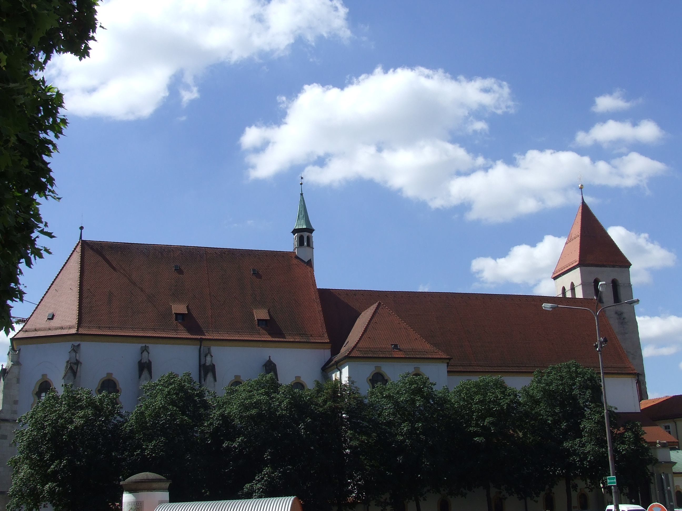 Stadt Regensburg, Stift zu unserer Lieben Frau zur alten Kapelle, Blick auf die Kirche von Norden